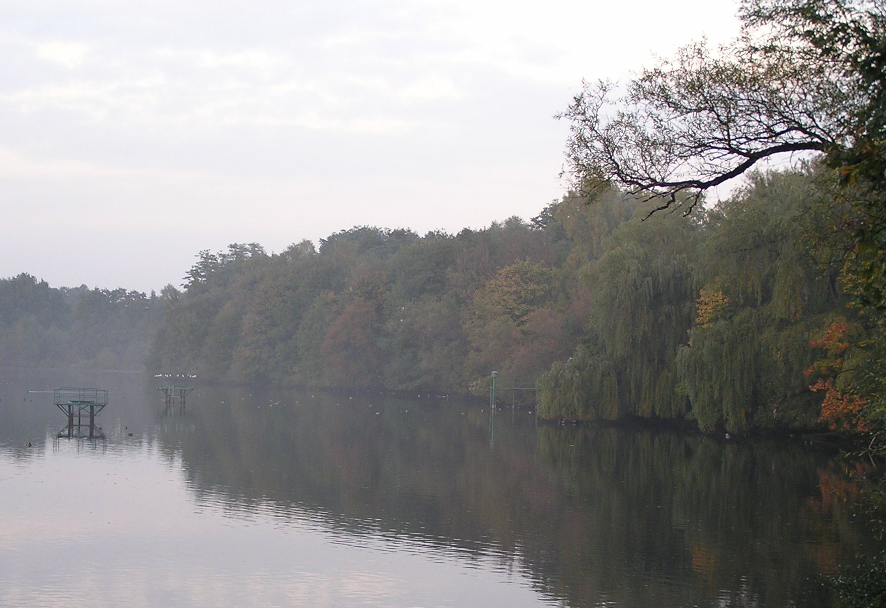 Lake "Blauer See", Dorsten